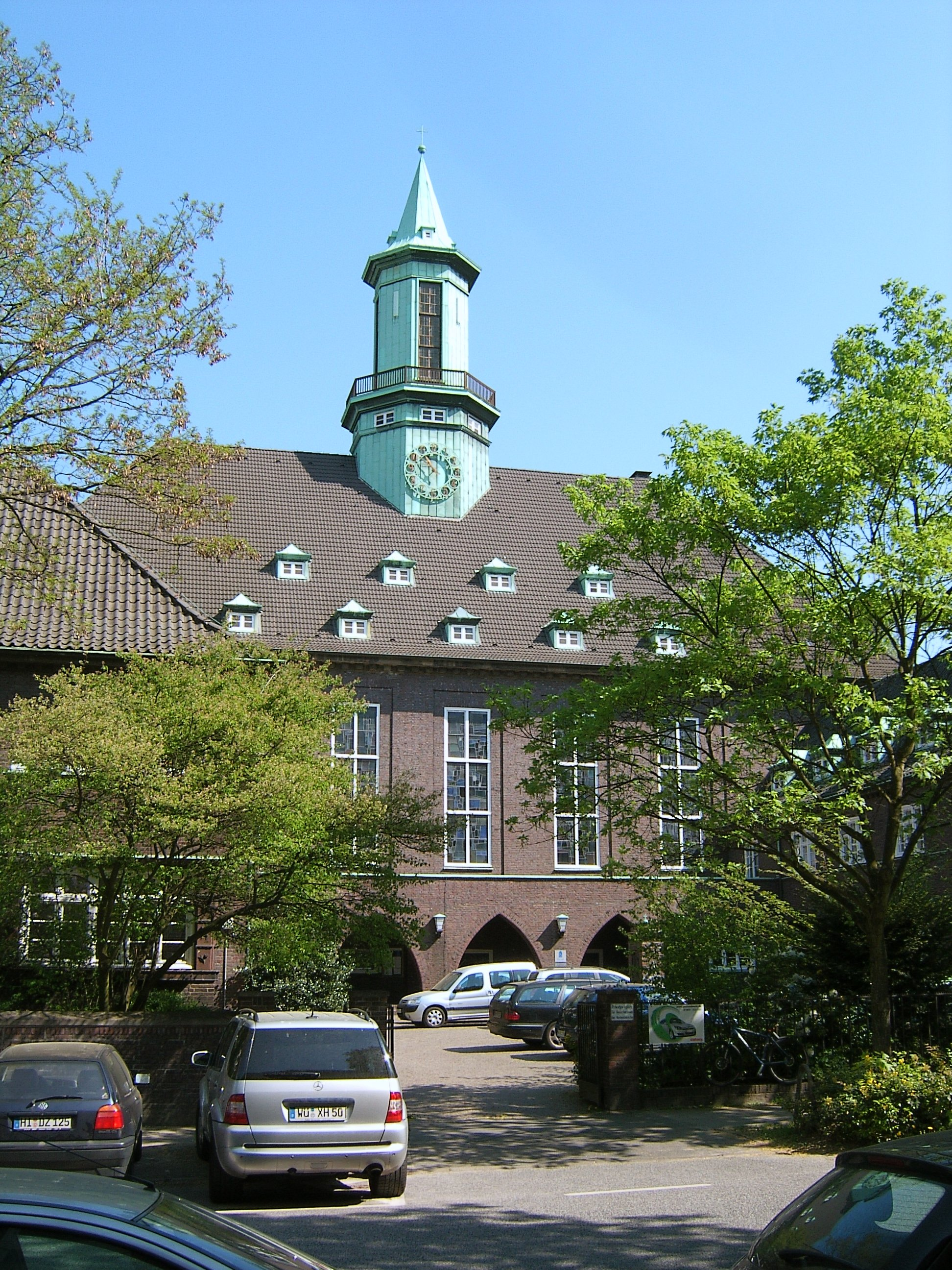 Die evangelisch-lutherische Heilandskirche im Winterhuder Weg auf der Uhlenhorst wurde 1926-28 nach Plänen von Emil Heynen erbaut.